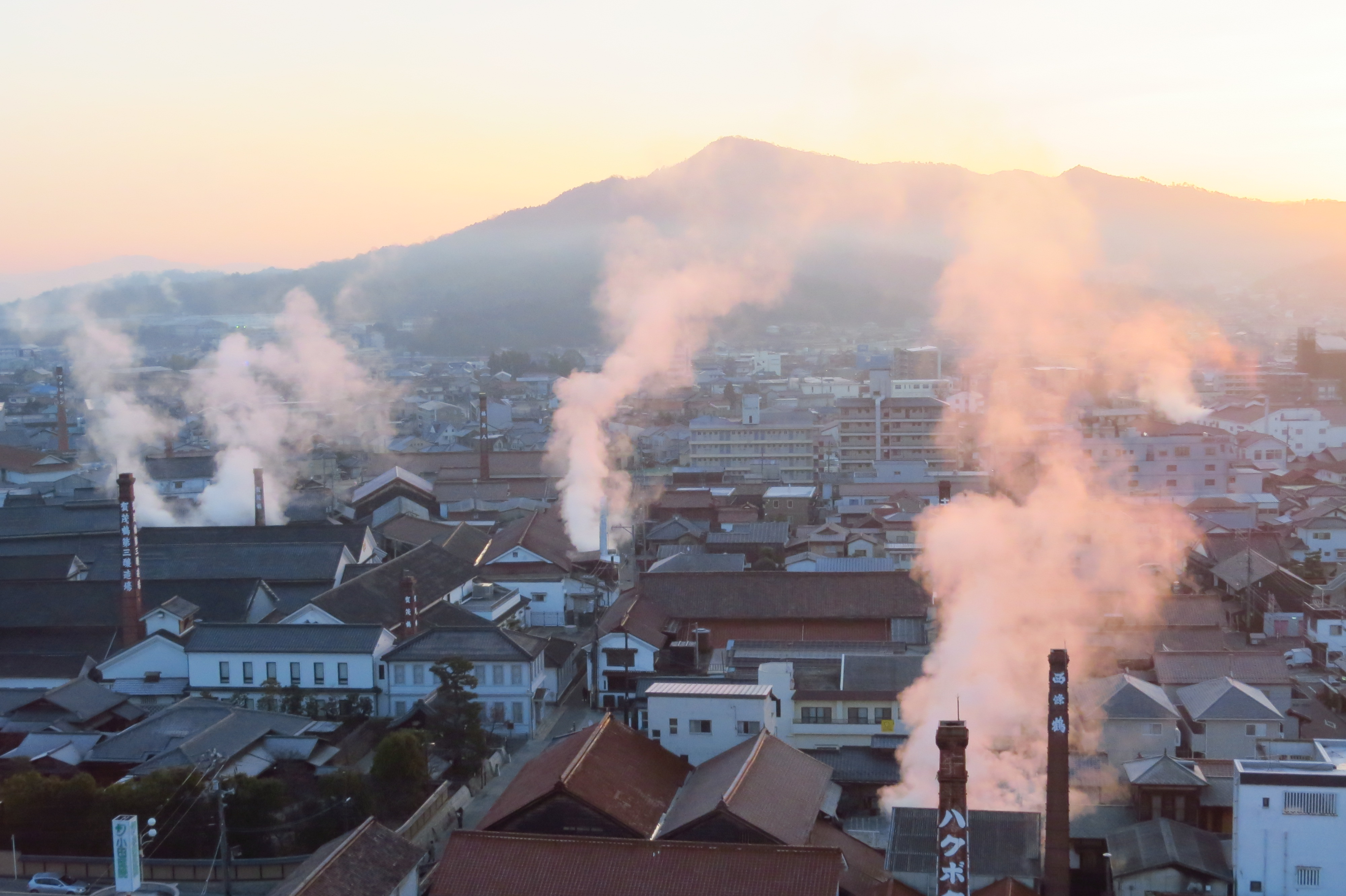 夜明け（西条町、2014年1月